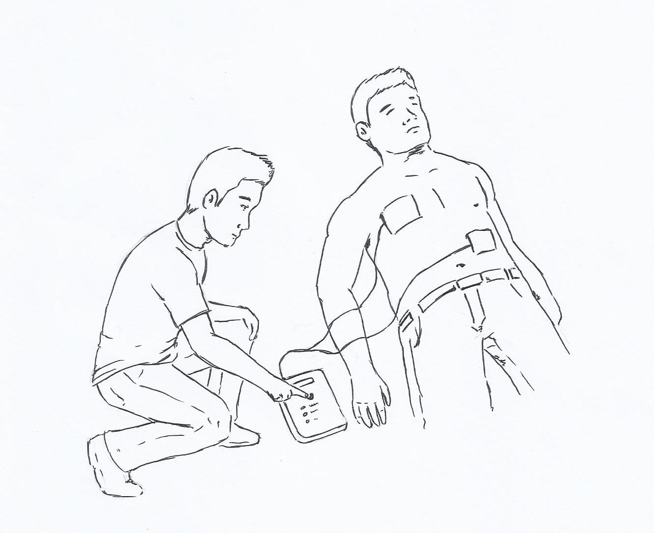 Merawat pesakit menggunakan automatik defibrilator luaran